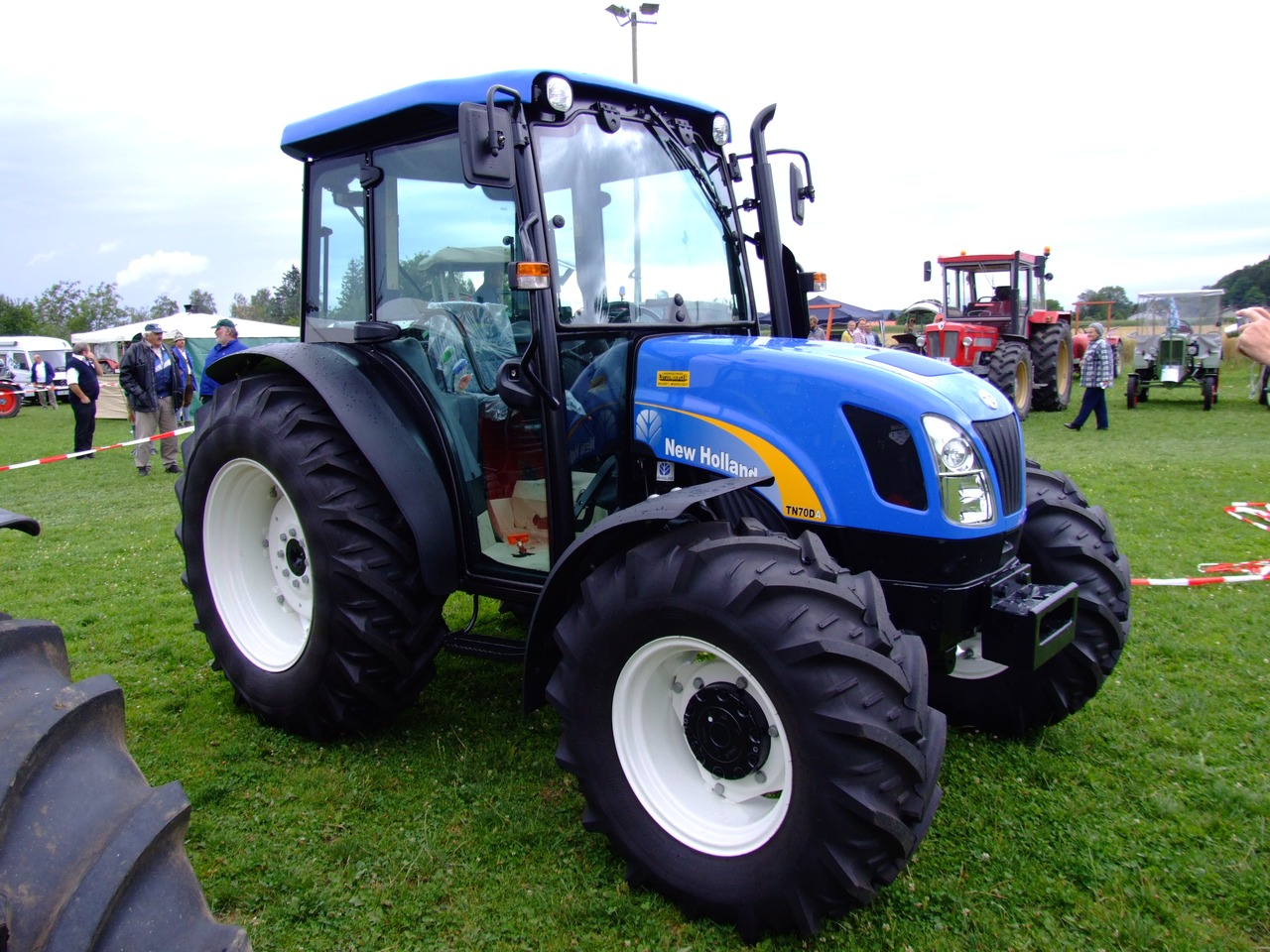 New-Holland-Traktor TN70DA